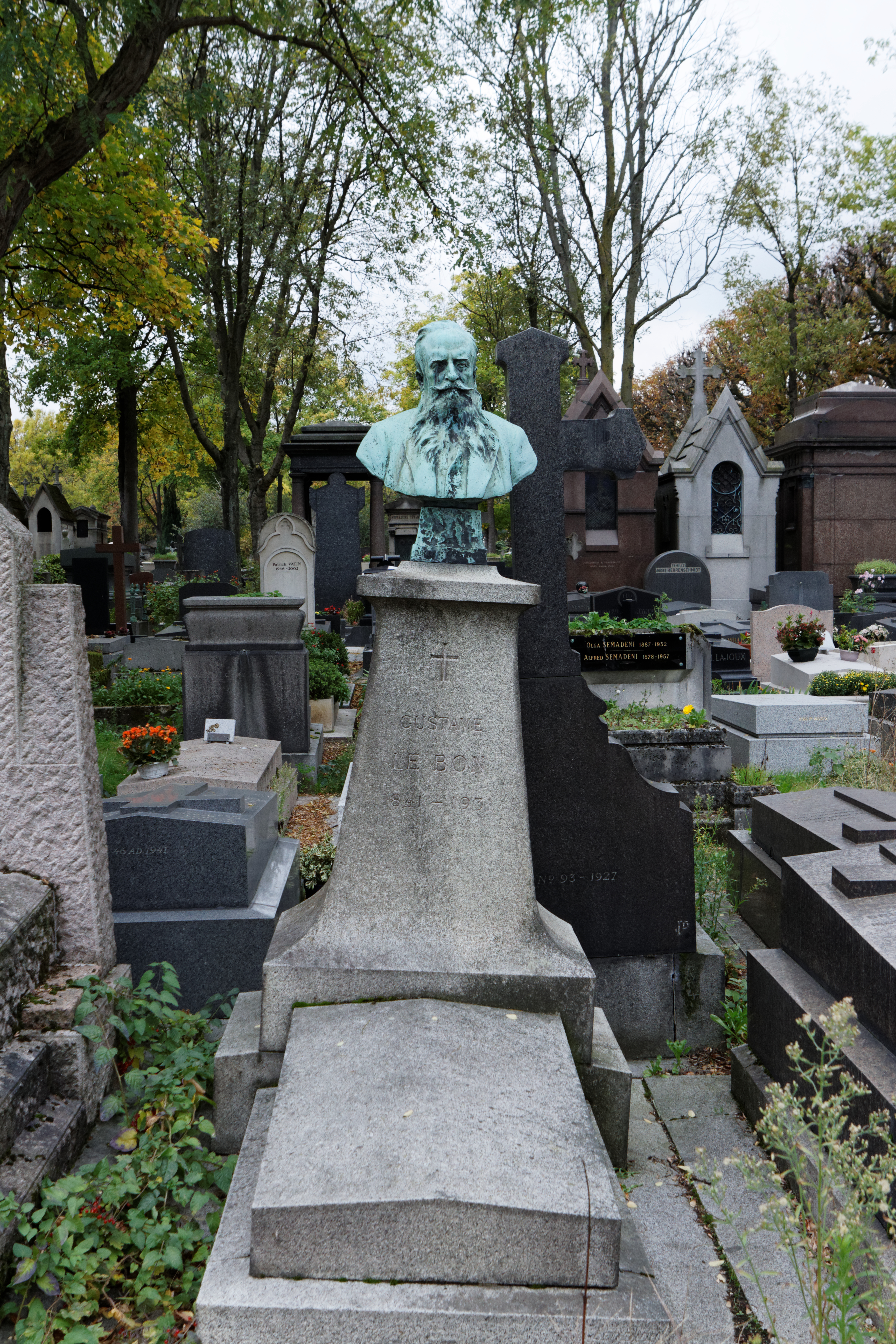 Sépulture de Gustave Le Bon (1841-1931), médecin, anthropologue, psychologue social et sociologue.